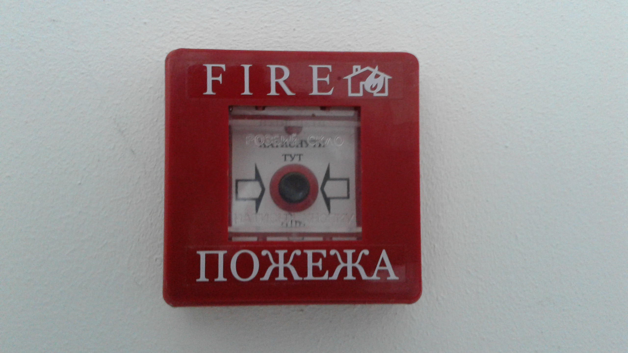 Пластикова коробка, скло